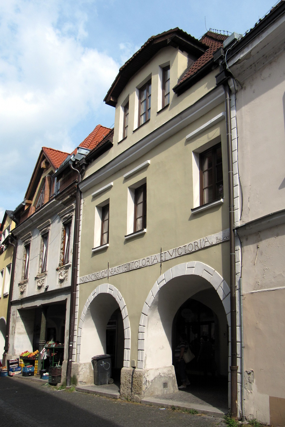 DOM MEŠTIANSKY, 16. stor, Hodžova ul. 4. Nápis: NON NOBIS DOMINE AST TIBI SIT GLORIA ET VICTORIA PSAL. CXIII!